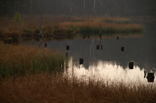 Haspelmoor, Uferbereich eines Moorgewässers andere Versionen: keine